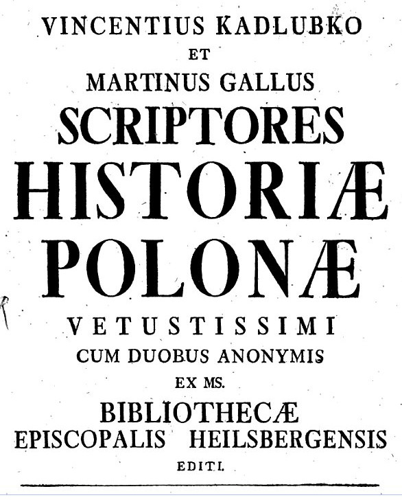 Pierwsza edycja drukowana Kroniki Galla Anonima